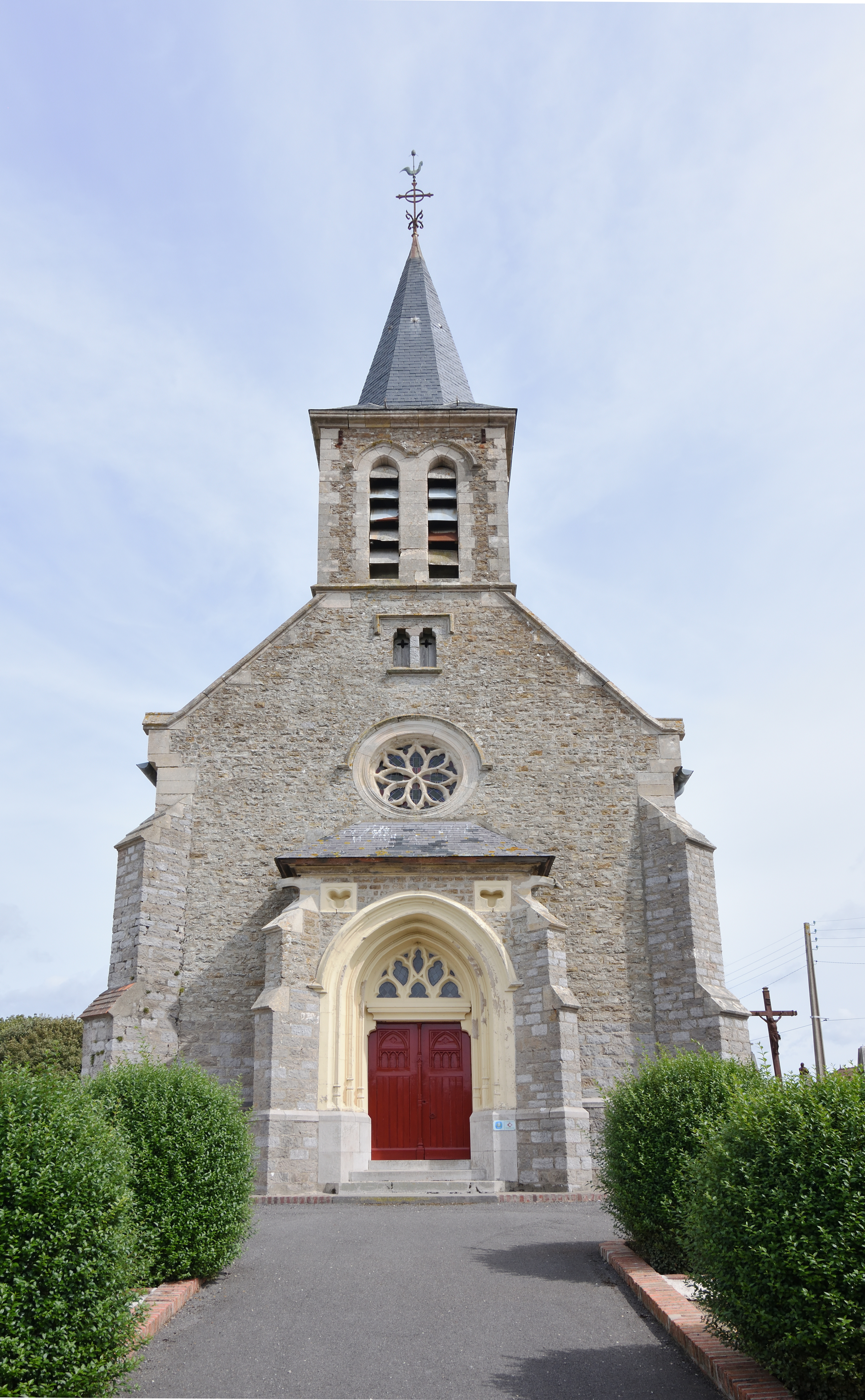 Église St.-Martin à Audembert